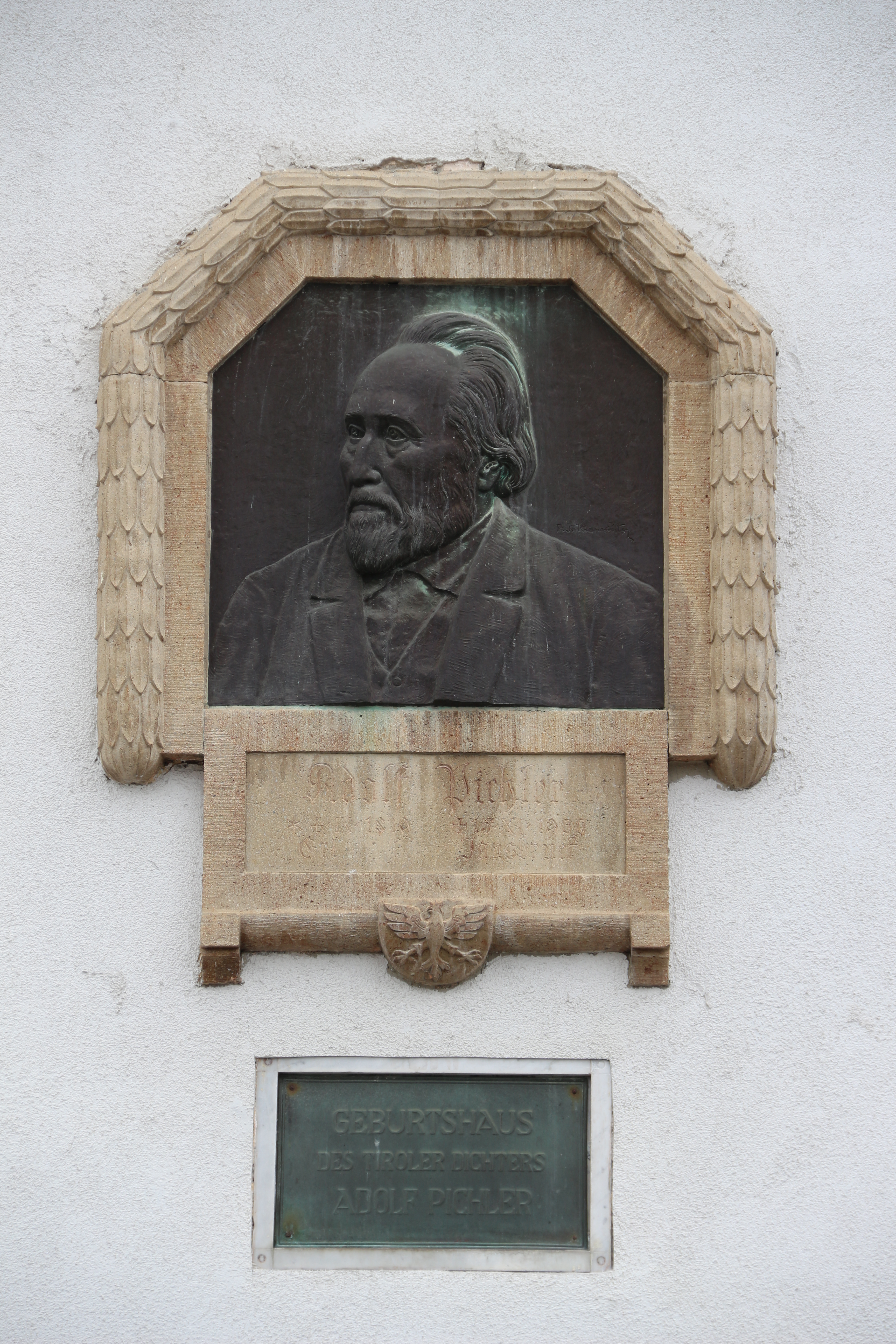 Gedenktafel von Adolf Pichler in Zollhaus, Gemeinde Erl.